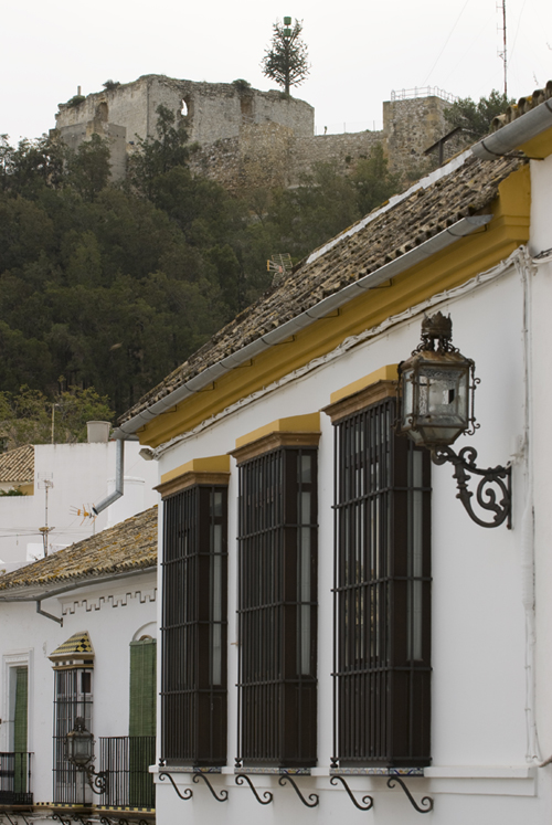 Ventanas en Morón de la Frontera